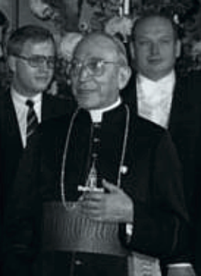 Agostino Casaroli in Germany in 1980.